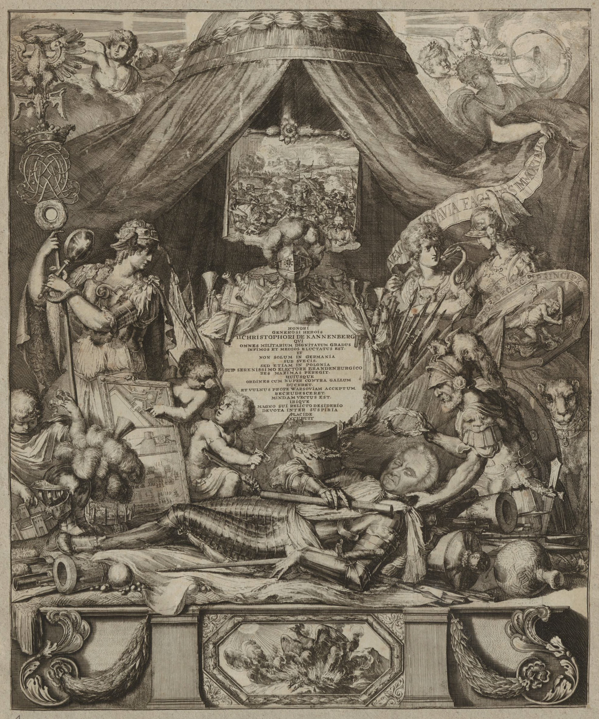 Grafik aus dem Klebeband Nr. 16 („Leichbegängnisse“) der Fürstlich Waldeckschen Hofbibliothek Arolsen Motiv: Aufbahrung Christoph von Kannenberg († 1673)